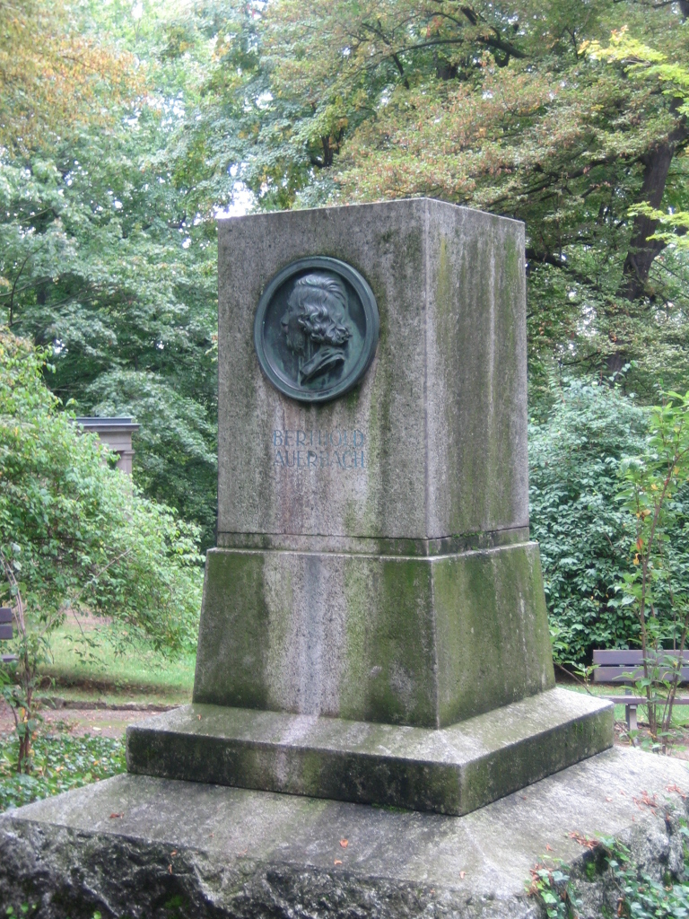 Auerbach-Denkmal im Kurpark in Stuttgart-Bad Cannstatt. Die 1909 von Hermann Volz geschaffene Bronzebüste Bertold Auerbachs wurde im Zweiten Weltkrieg eingeschmolzen und 1951 durch ein bronzenes Reliefmedaillon von A. Haendler ersetzt.